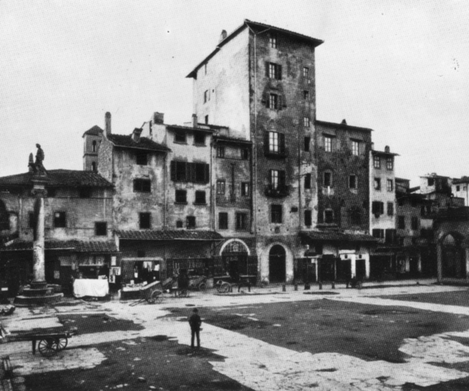 Piazza della repubblica in 1883, torre dei caponsacchi